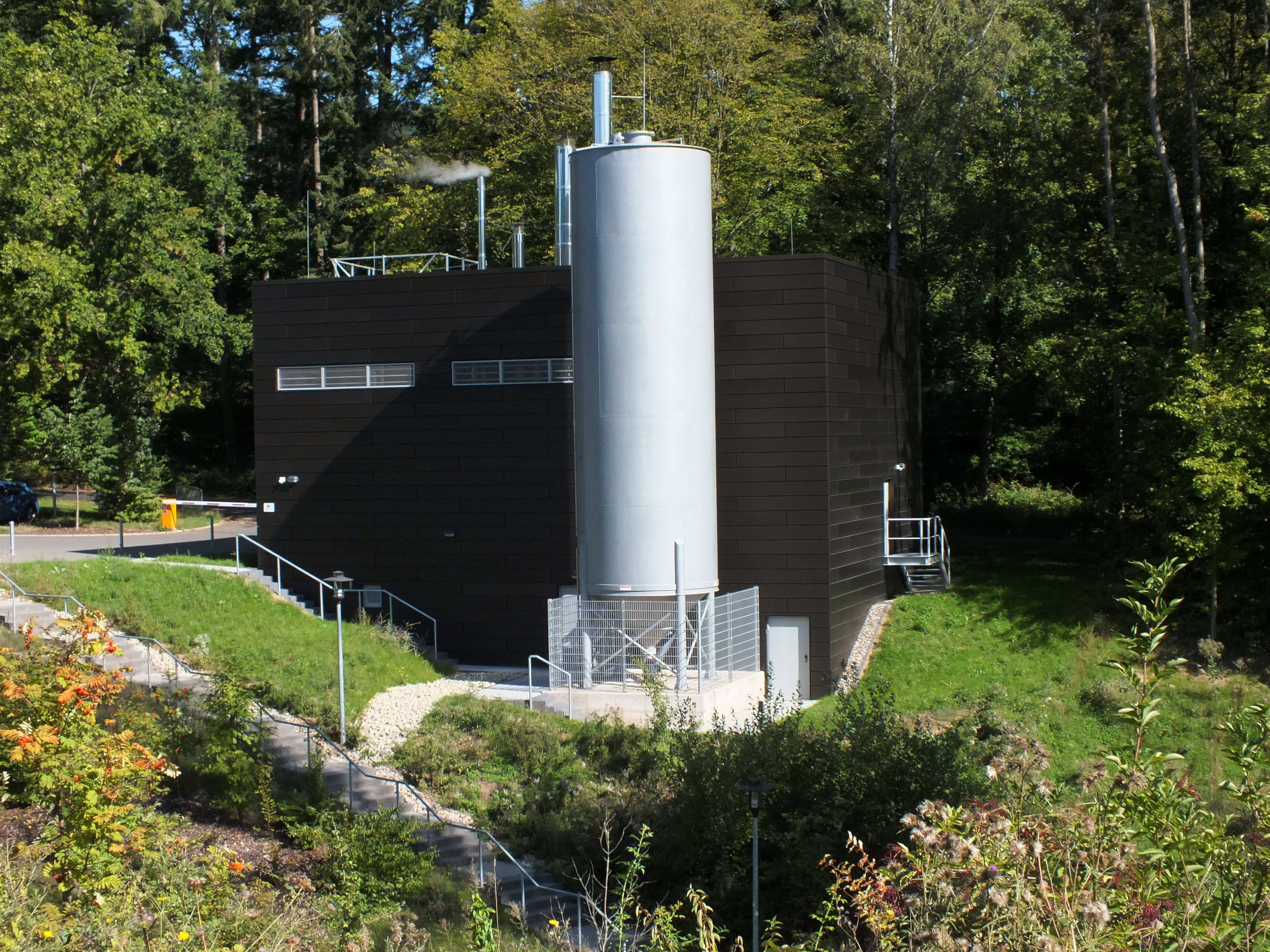 Hochschule Trier, Hauptcampus (Standort Schneidershof) - Heizwerk der Holzschnitzelheizung, eingeweiht 2015. Löste Ölheizung ab.